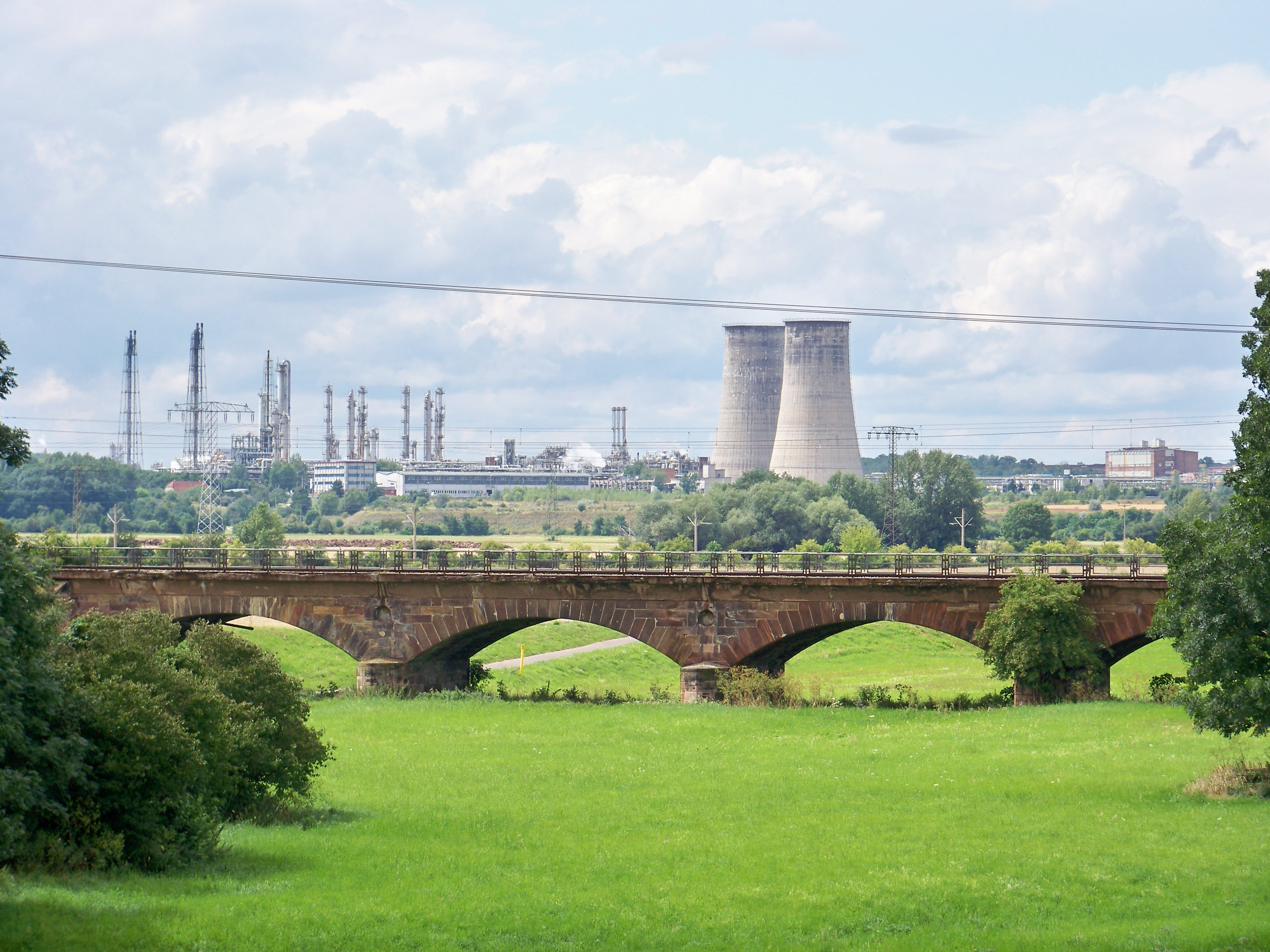 Chemiepark Leuna von Bad Dürrenberg aus gesehen, im Vordergrund die Saalebrücke der Bahnstrecke Leipzig Hbf-Weißenfels